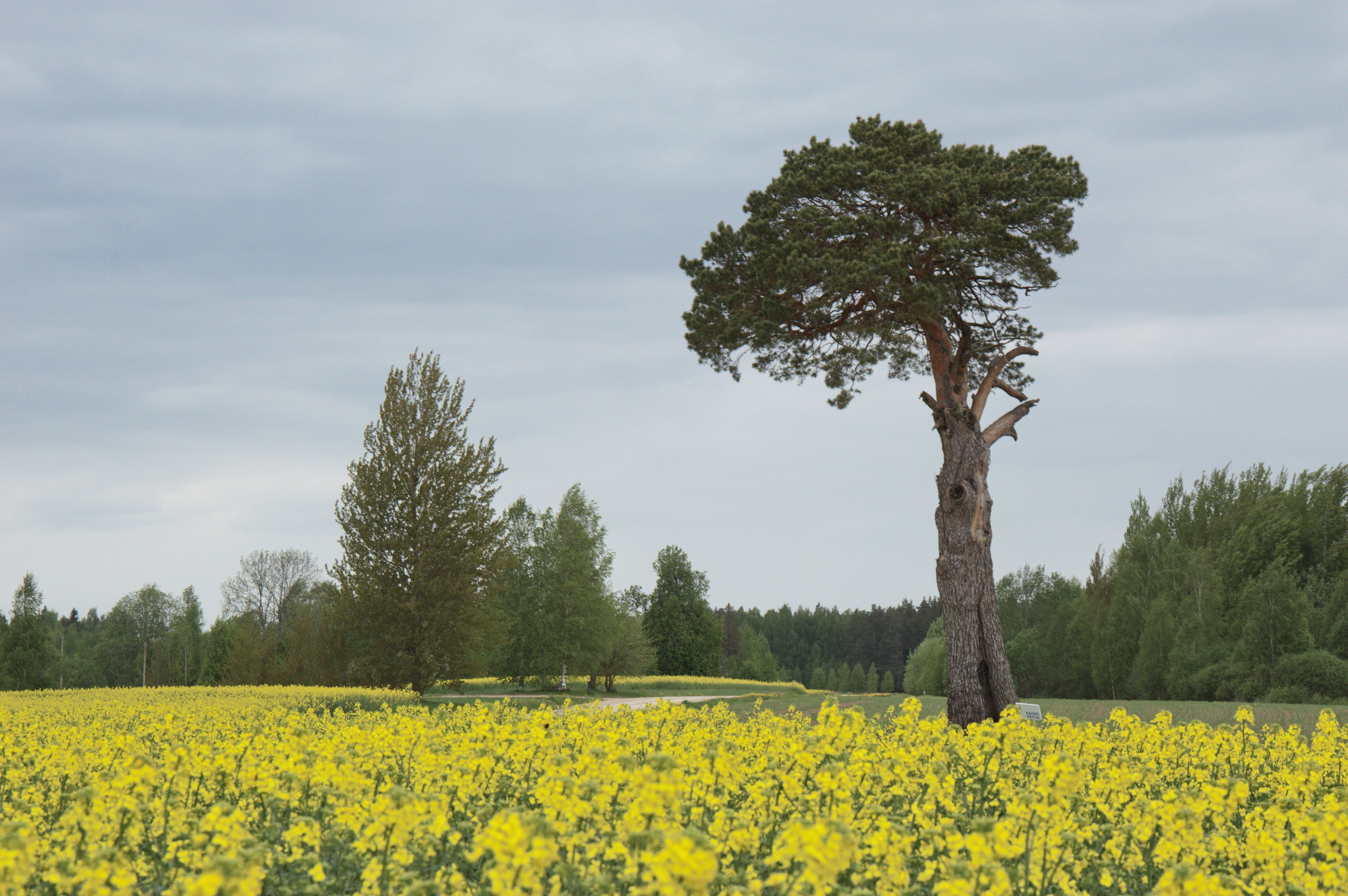 Mänd "Kahar pettai".